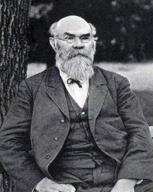 Долженков, Василий Иванович